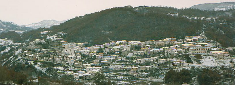 Panorama invernale di Forlì del Sannio